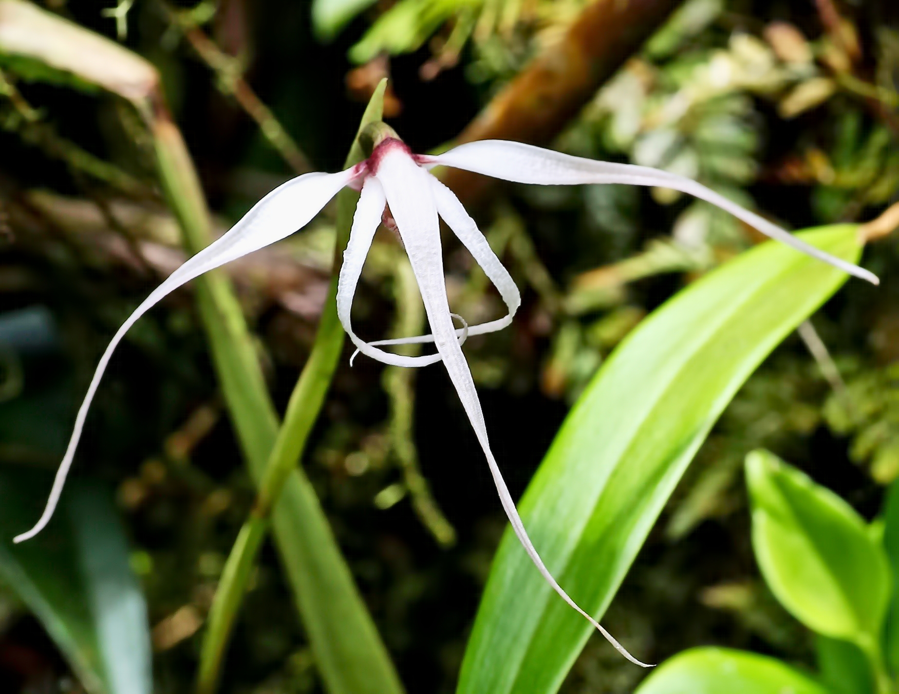 Maxillaria ecuadorensi, Ecuador, Mindo, Rio Bravo Reserve